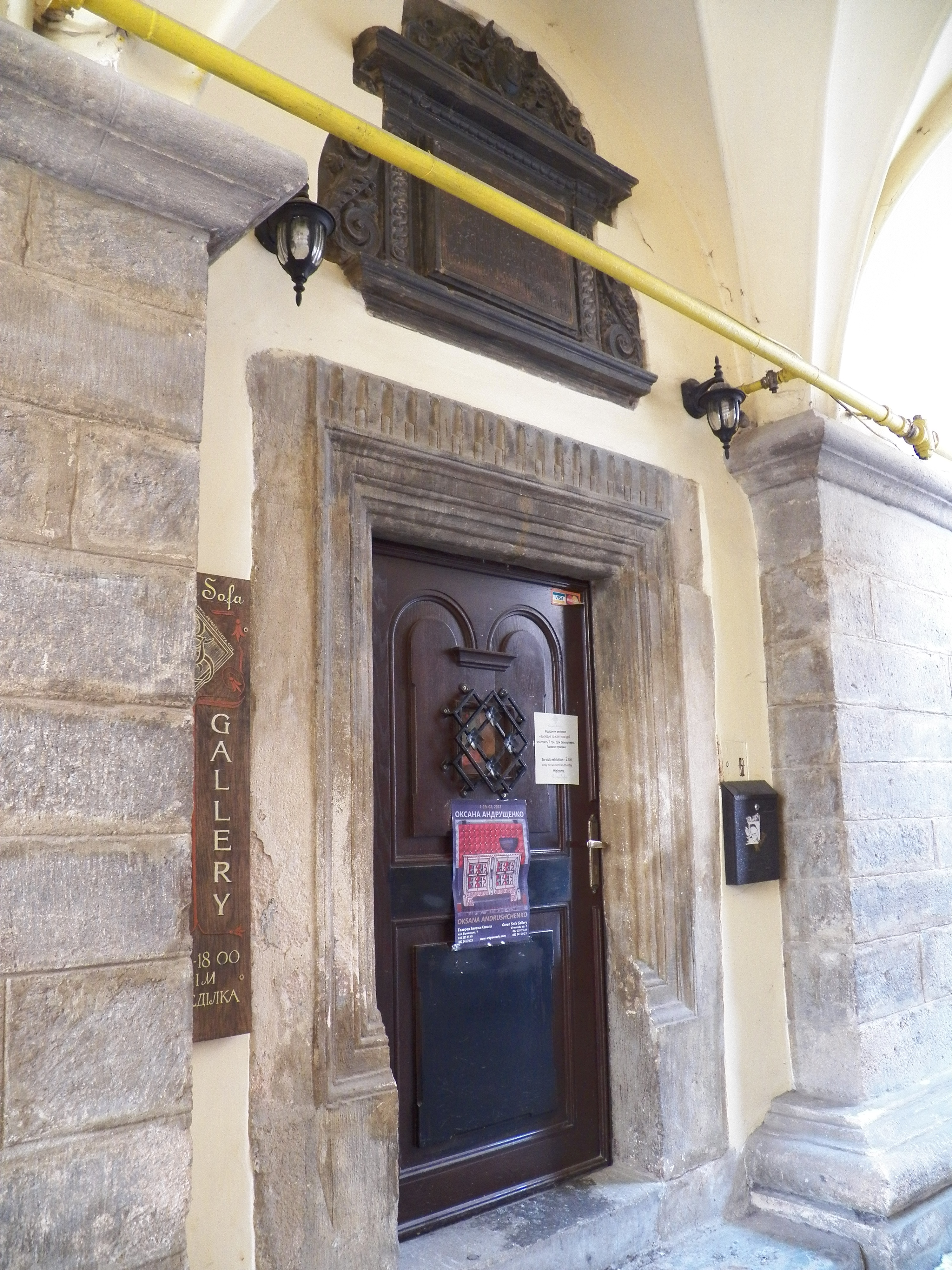 дзвіниця Вірменського собору, Львів, Вірменська, 7